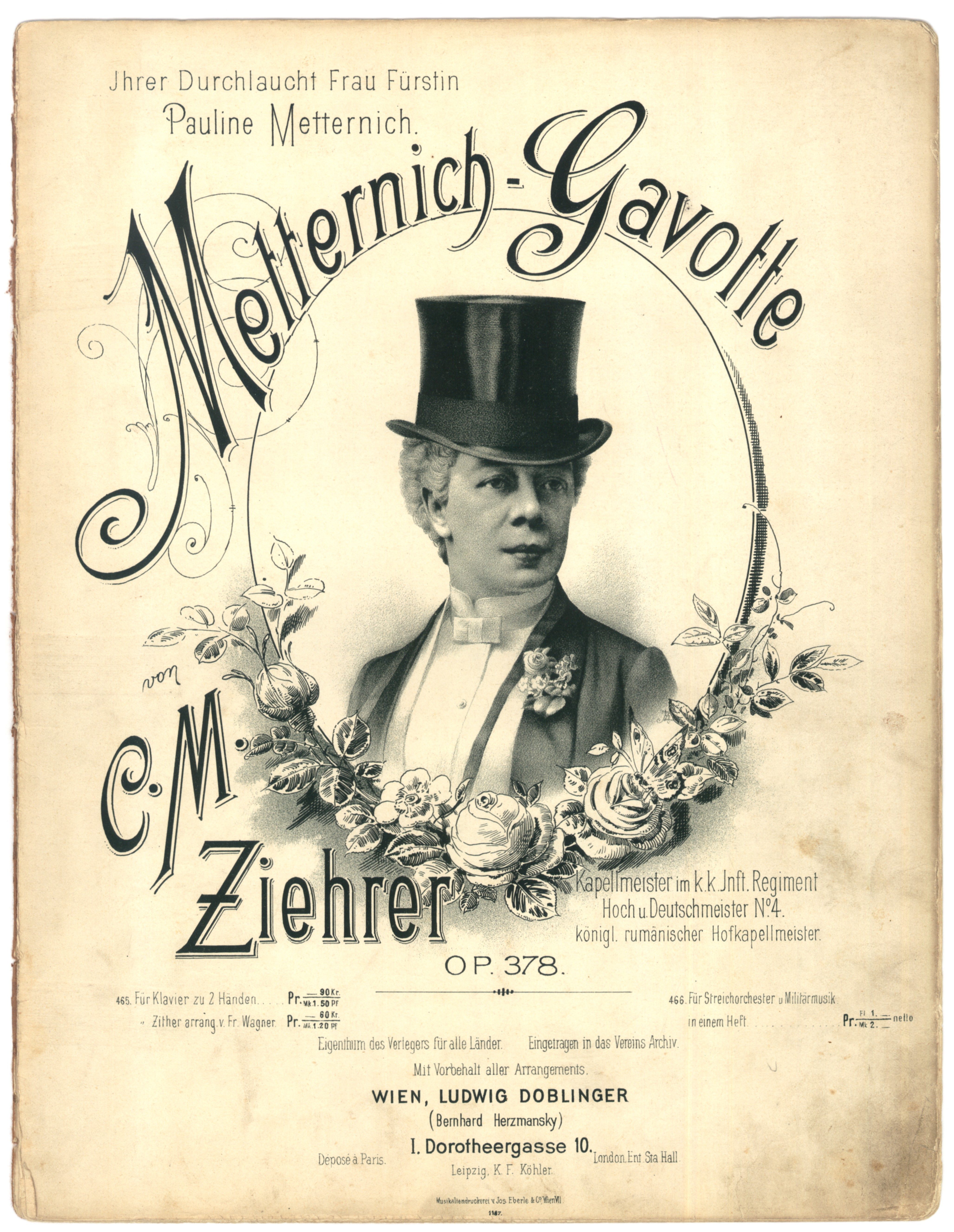 sheet music: Carl Michael Ziehrer, 1843–1922, Metternich-Gavotte, op.378; Wien, Doblinger (D.465)